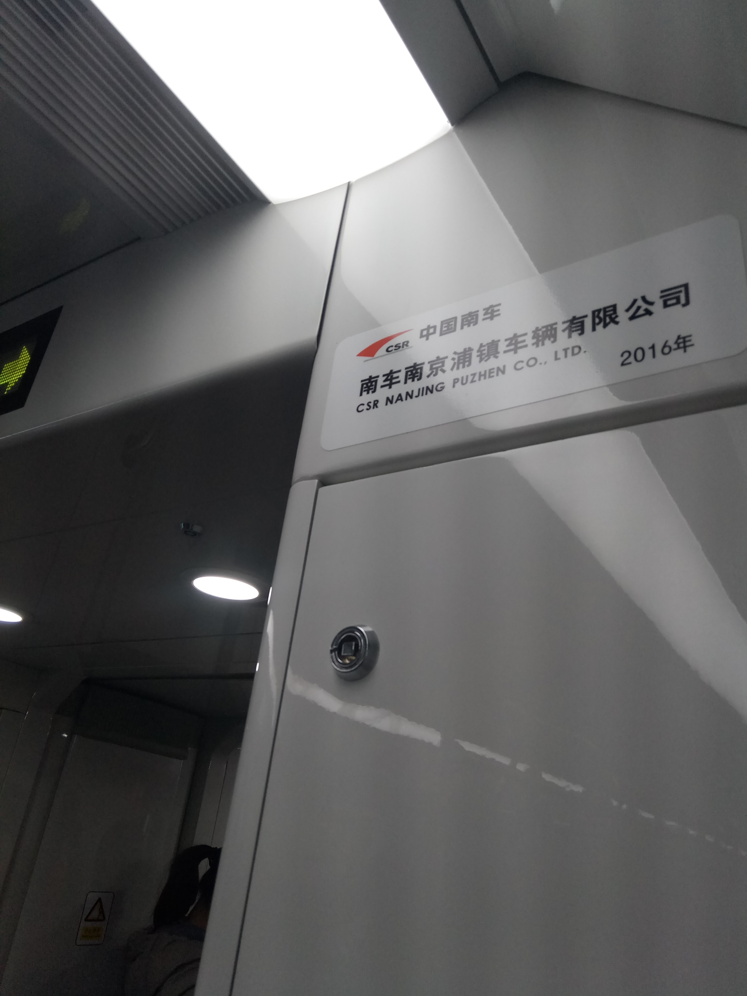 合肥轨道交通1号线车辆由中国南车制造